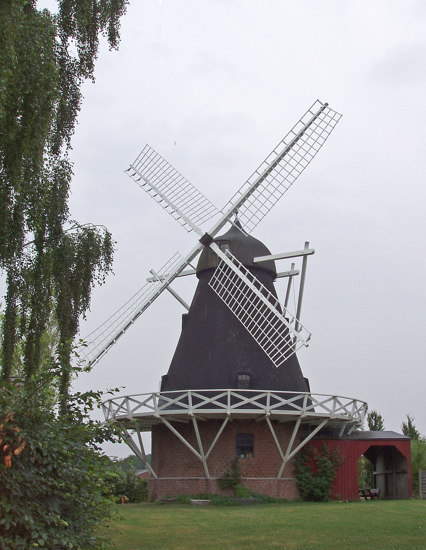 Gylling Mølle Odder Kommune